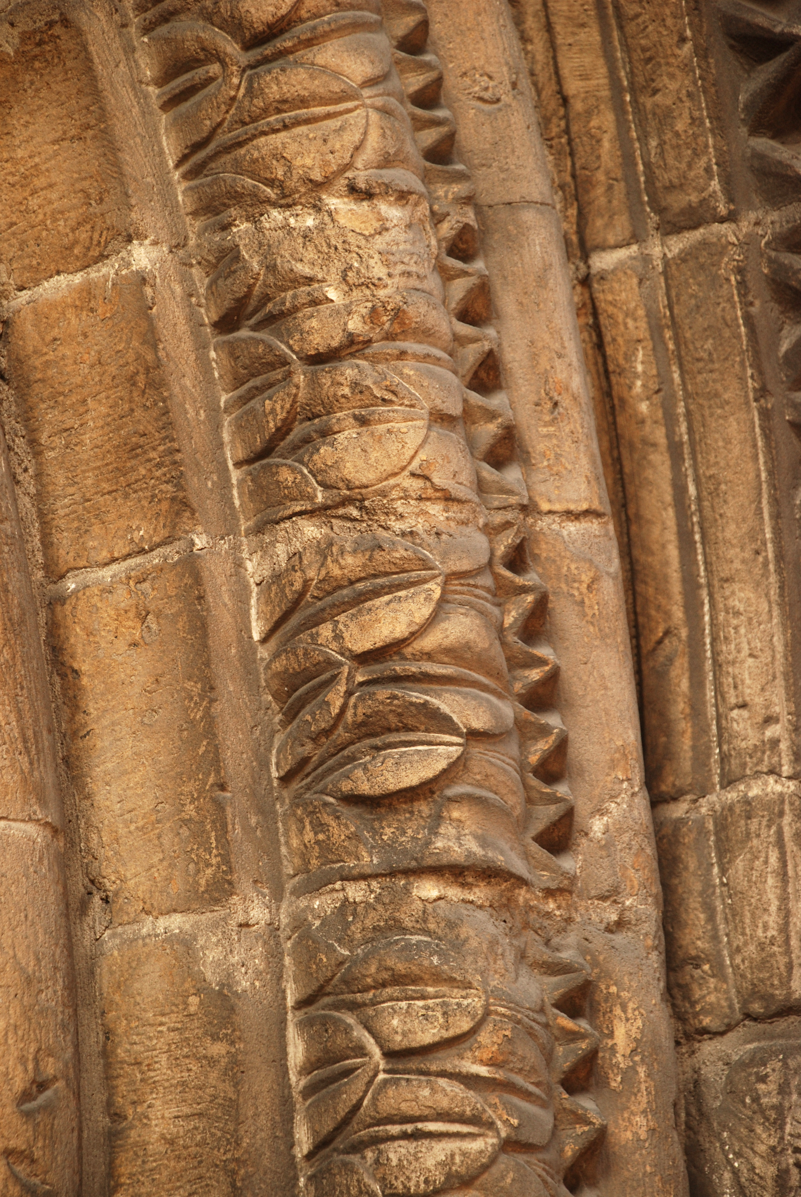 Belgique - Louvain - Chapelle de la Porte Romane